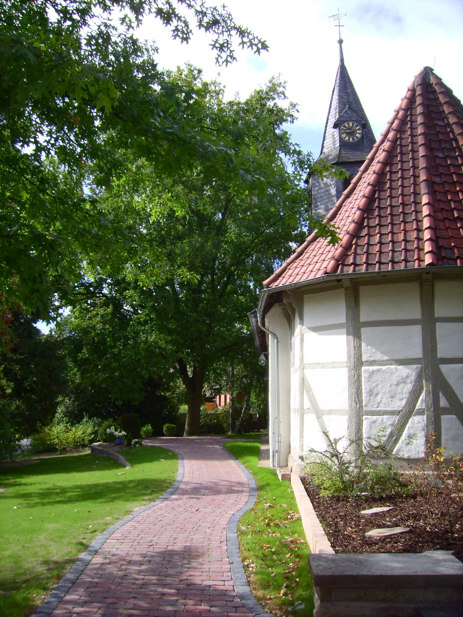 2011 erstellter Taufweg an der evgl.-luth. St.-Urban-Kirche Klein Ilsede